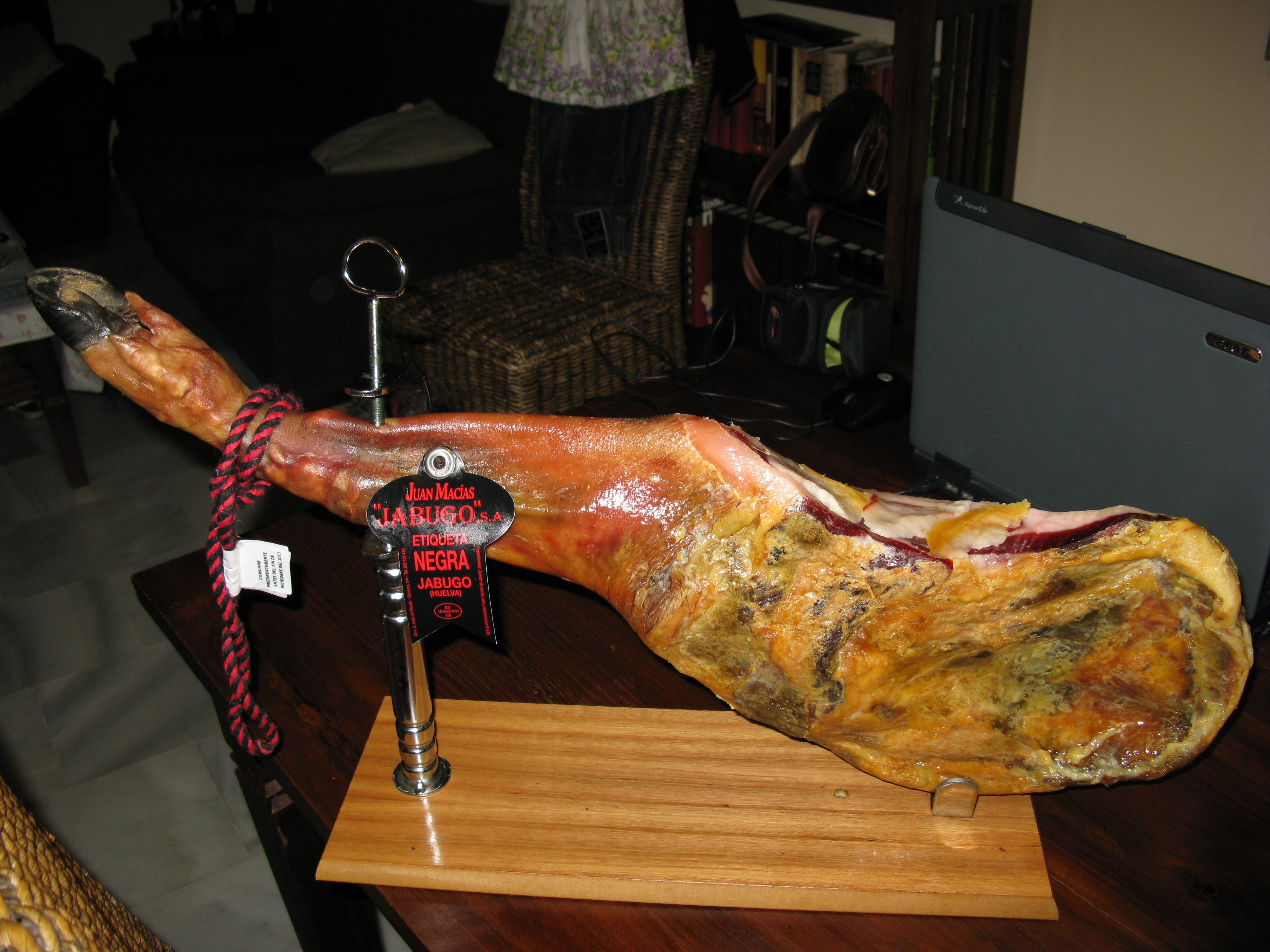 Paletilla de Jabugo